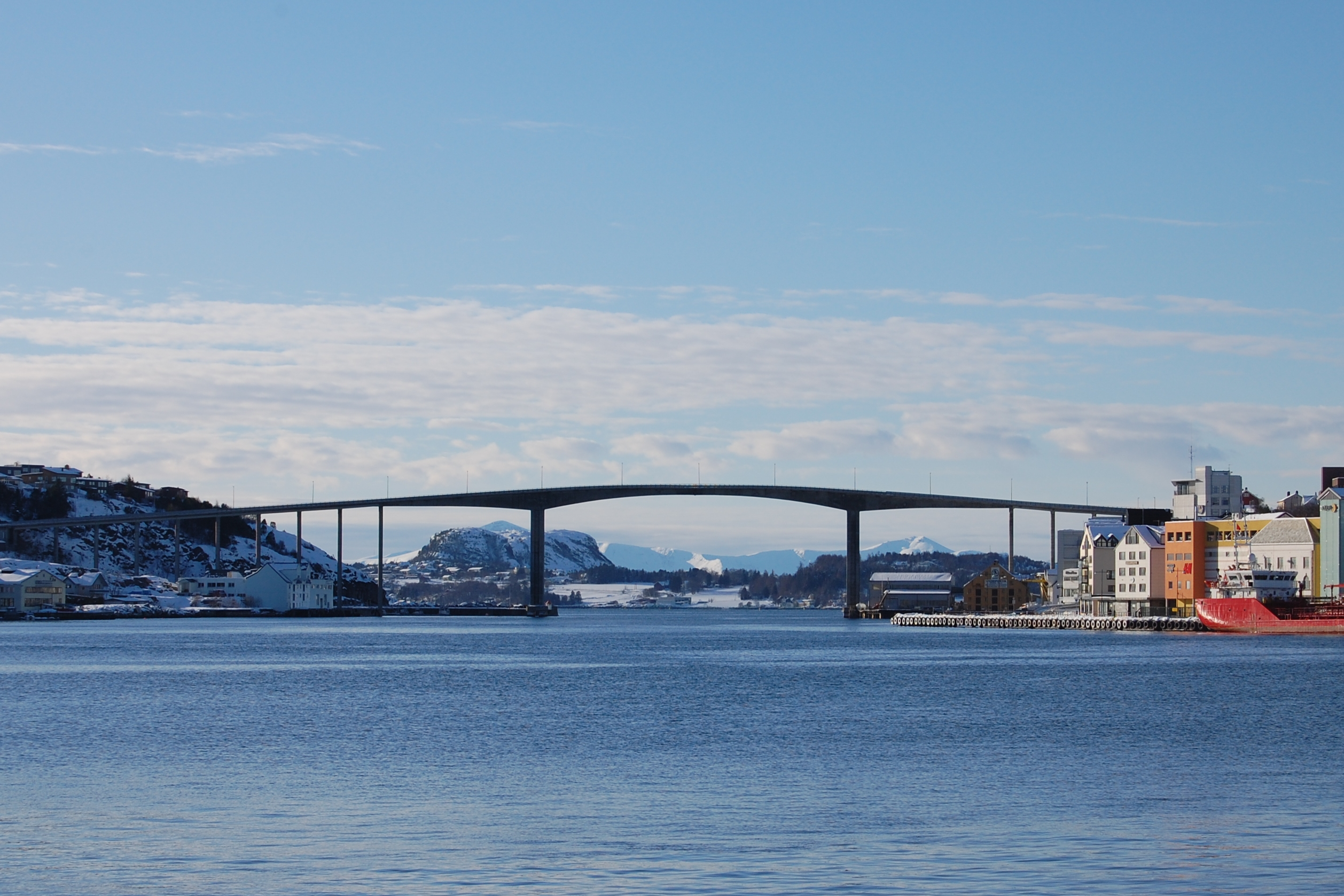 Norsk (bokmål): Sørsundbrua i Kristiansund